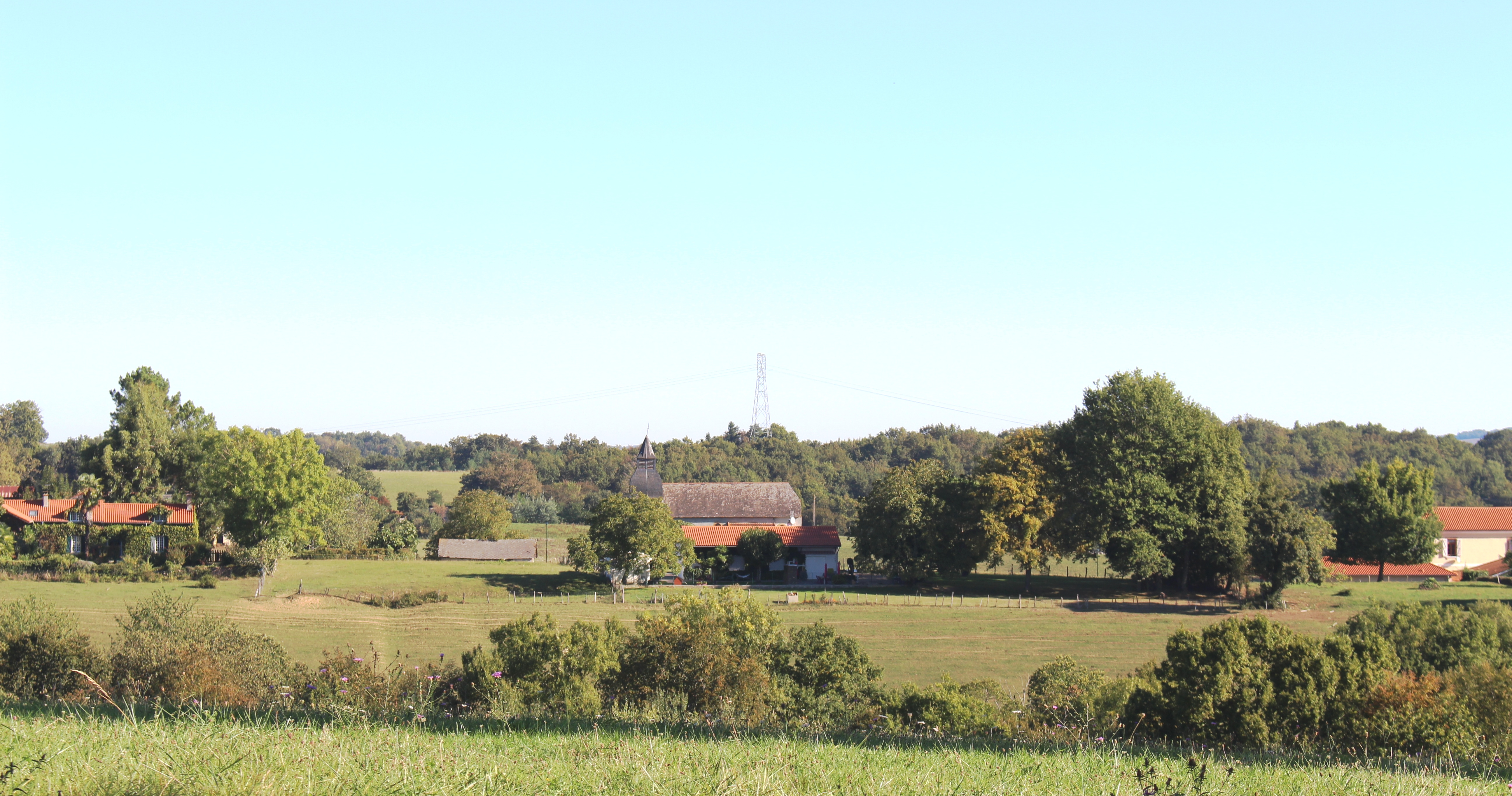 Marquerie (Hautes-Pyrénées)